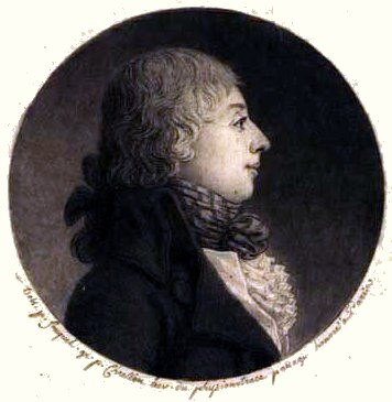 Den norske revisjonsministeren Hans Hagerup Falbe (1772-1830)